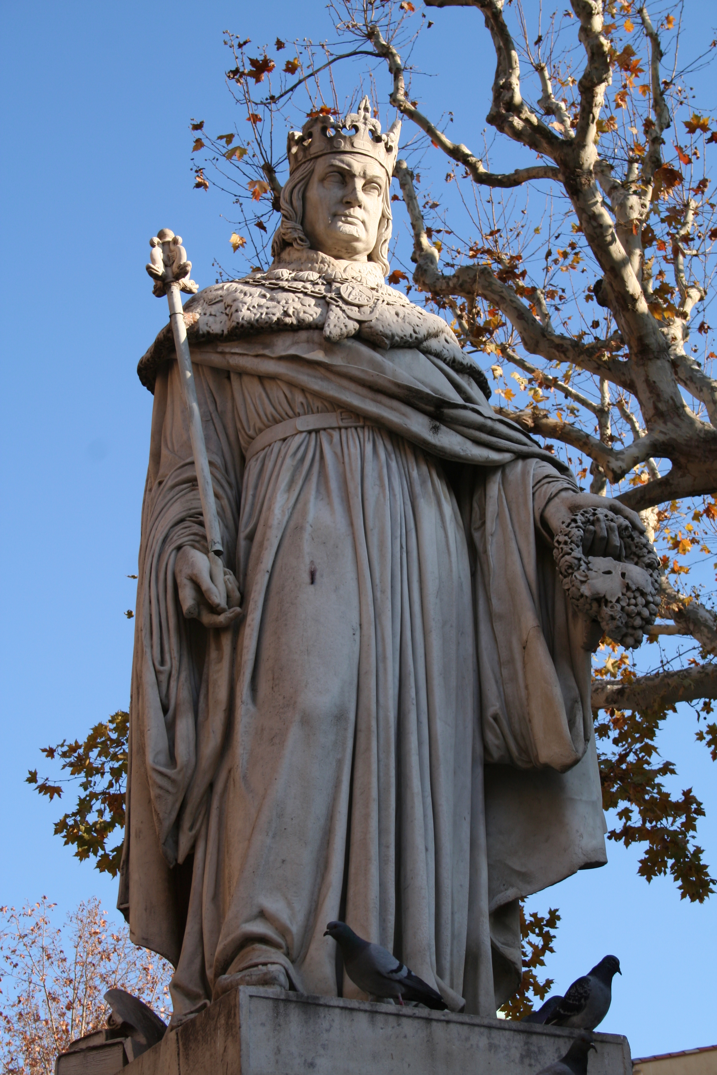 René Ier de Naples, Aix-en-Provence (France).